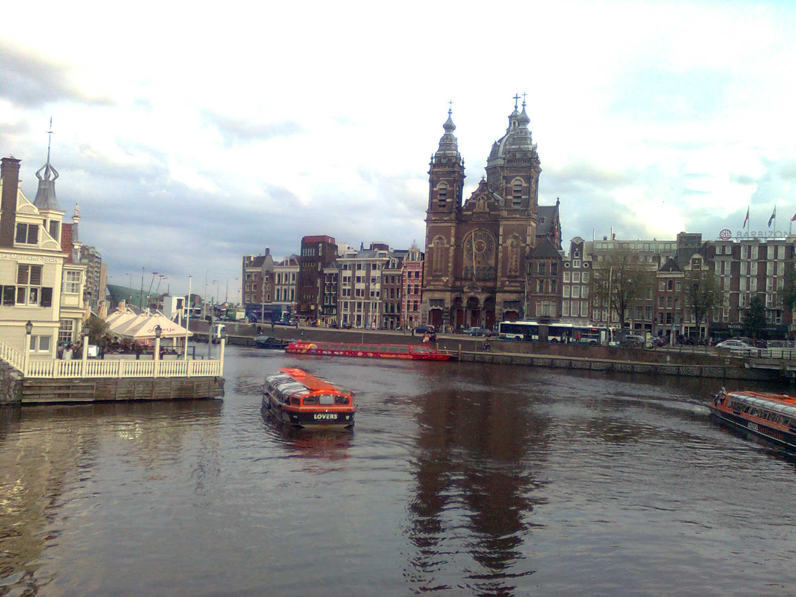 Фото